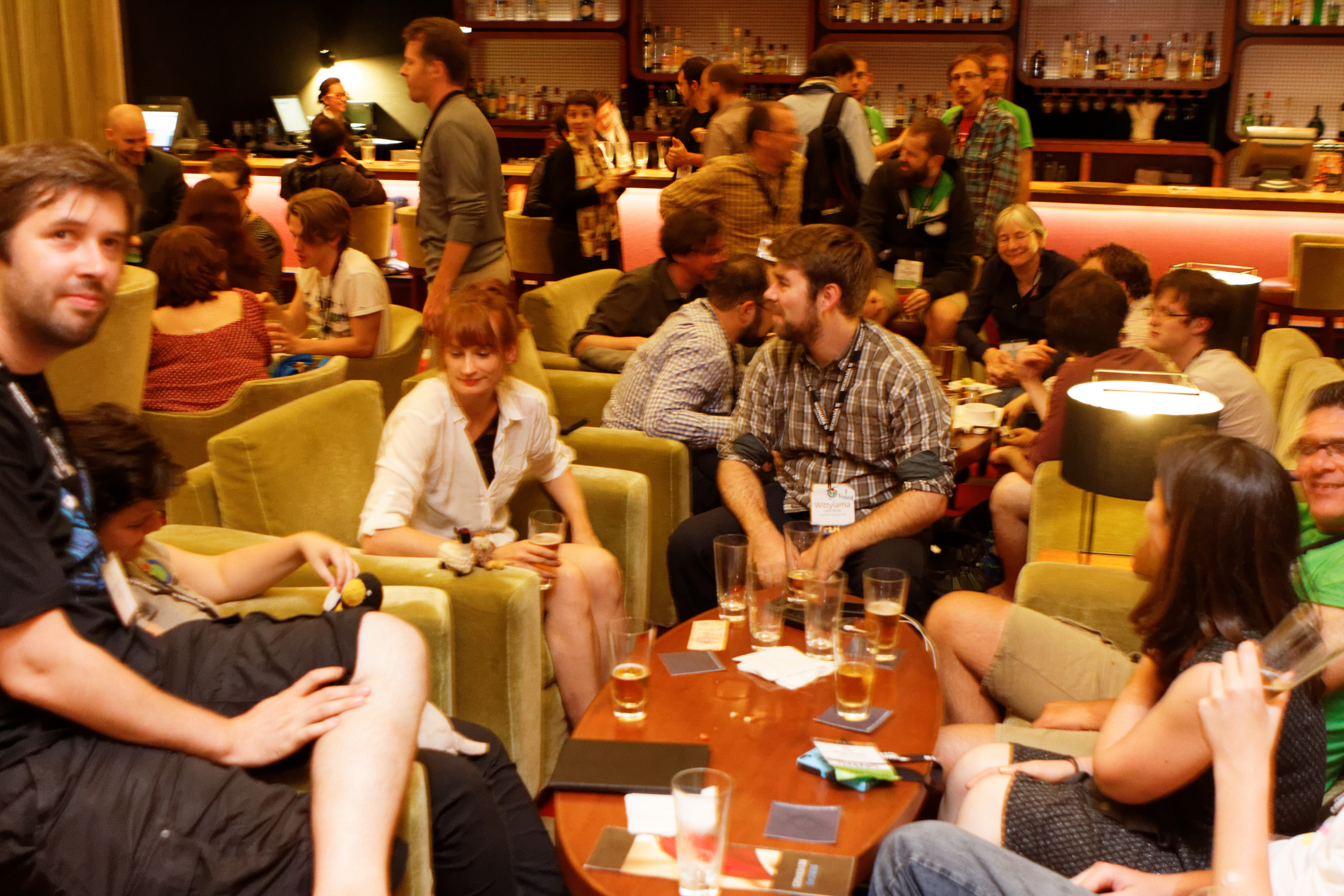 Hilton Mexico City Reforma